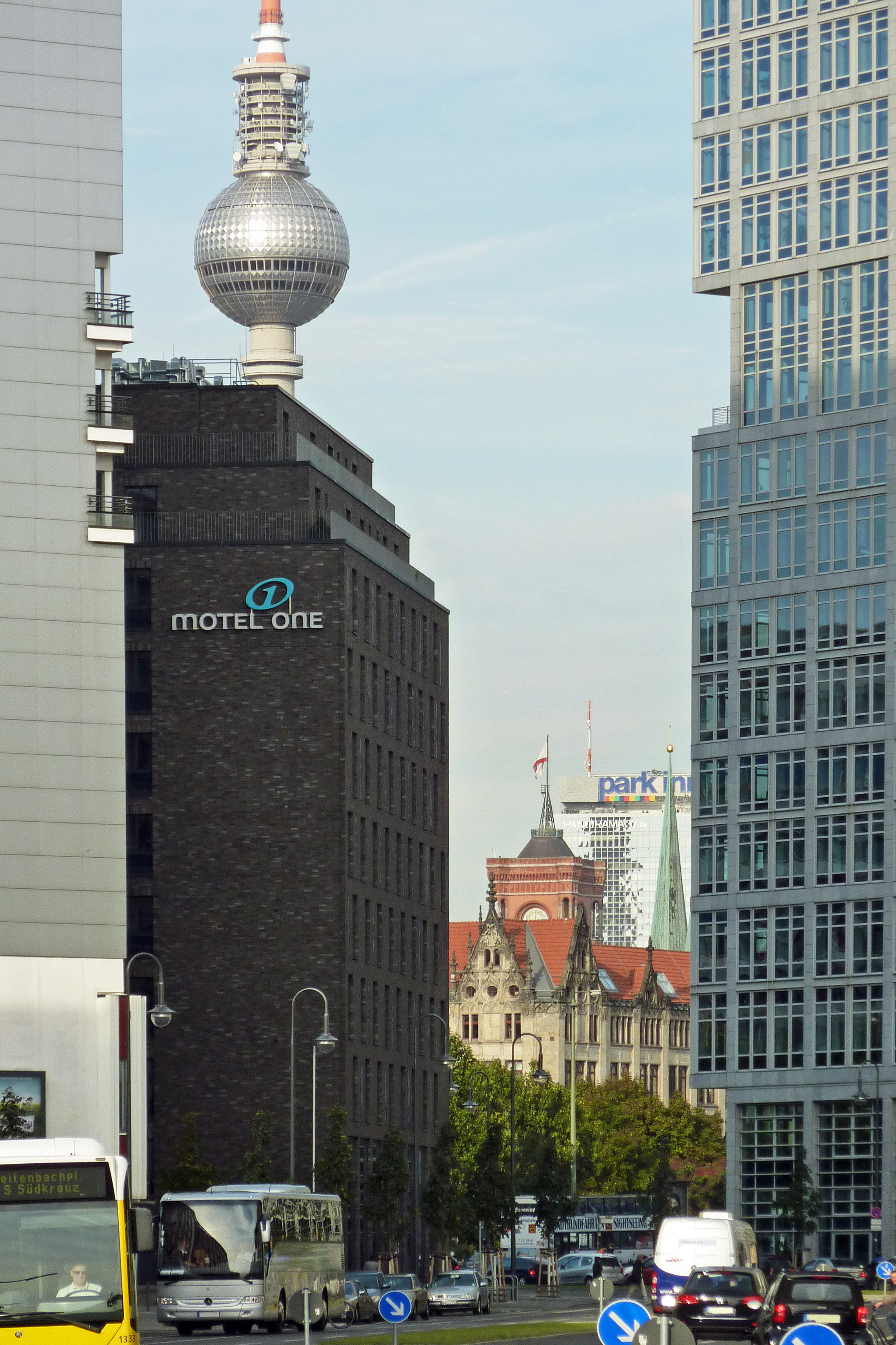 Axel-Springer-Straße in Berlin-Mitte, Blickrichtung Nordost